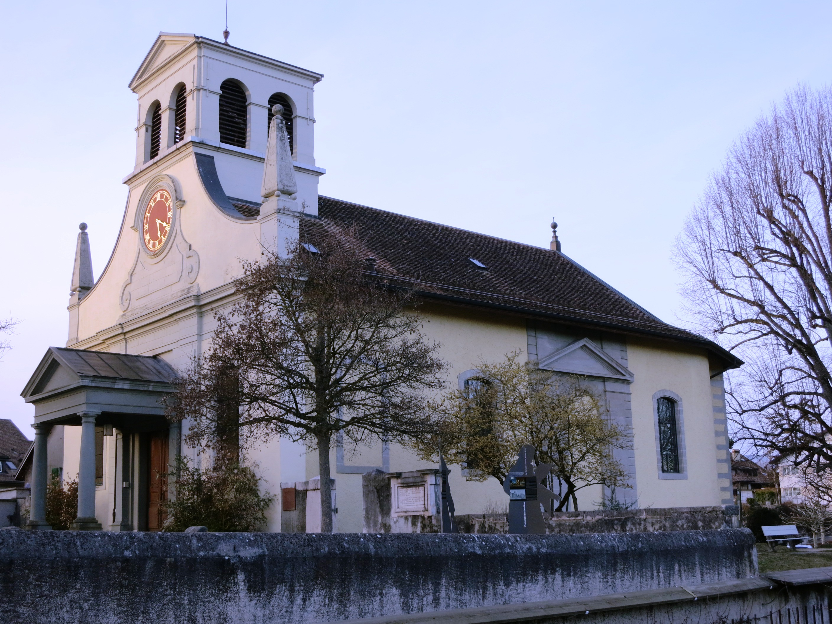 Kirche Prangins VD, Schweiz